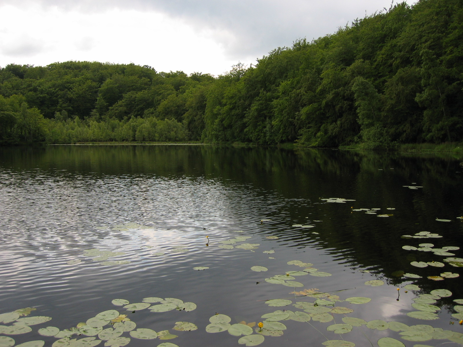 Schwarzer See, bei Sellin auf Rügen, Deutschland